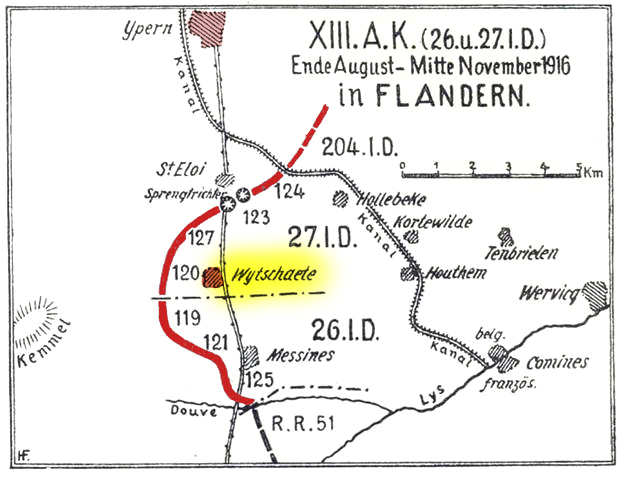 Karte: Das XII. (württ.) Armee-Korps 1916 in Flandern, nachträglich koloriert